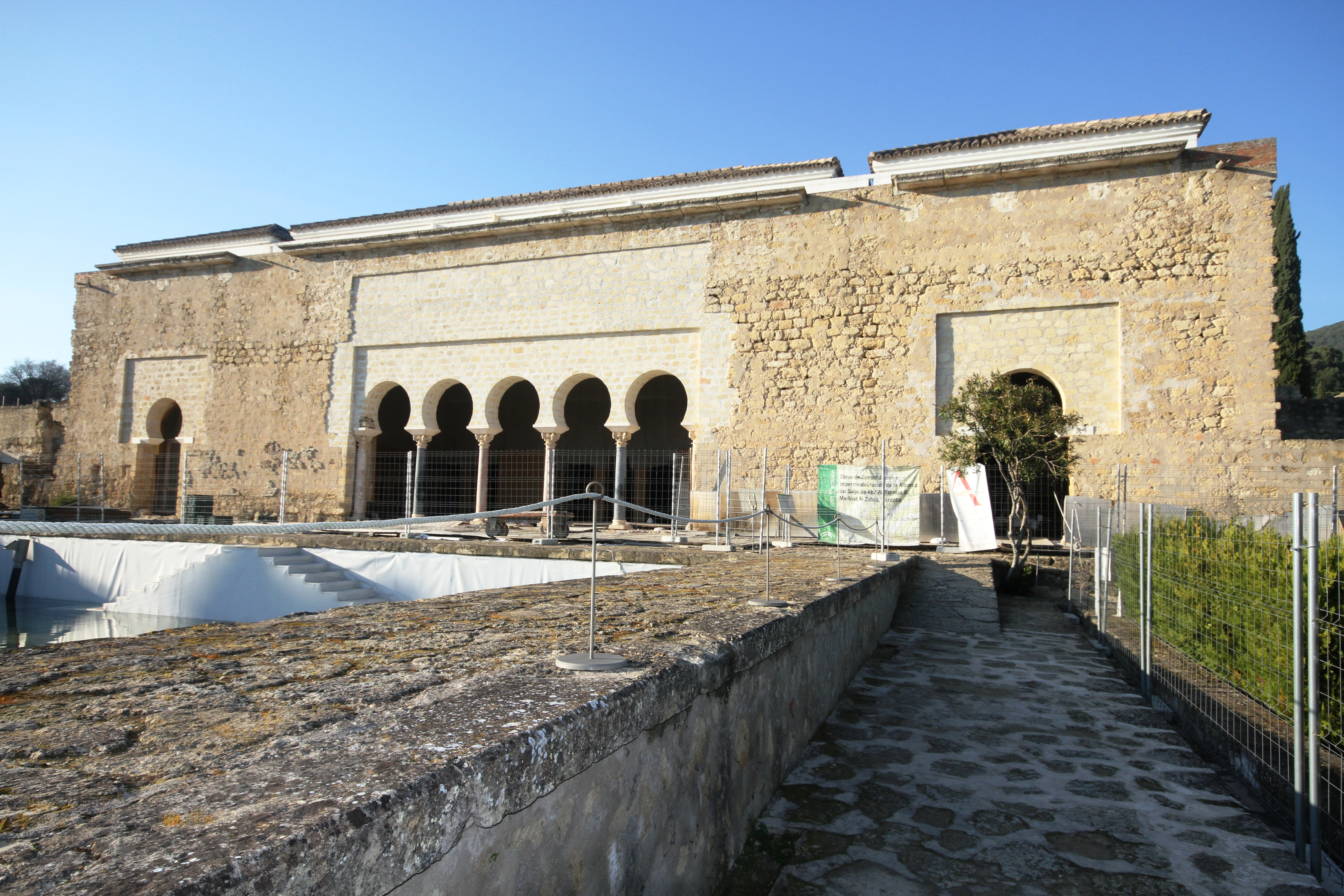 Salão de Abderramão III